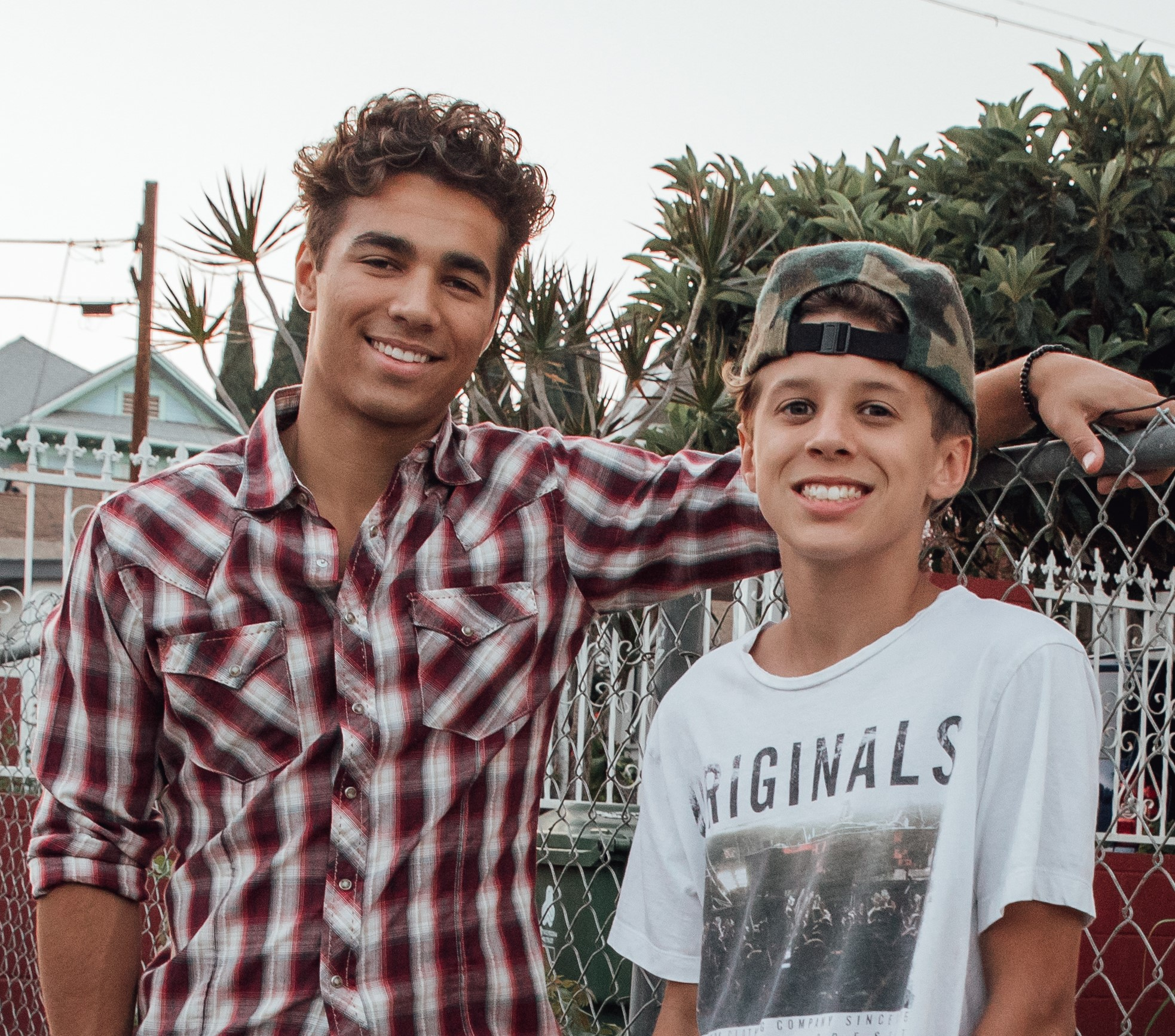 CB30 is an American country music group composed of brothers Christian (born May 30, 2001) and Brody Clementi (born March 30, 2004). The duo’s name is derived from their first initial of each of their first names and the fact that they were both born on the 30th of the month.